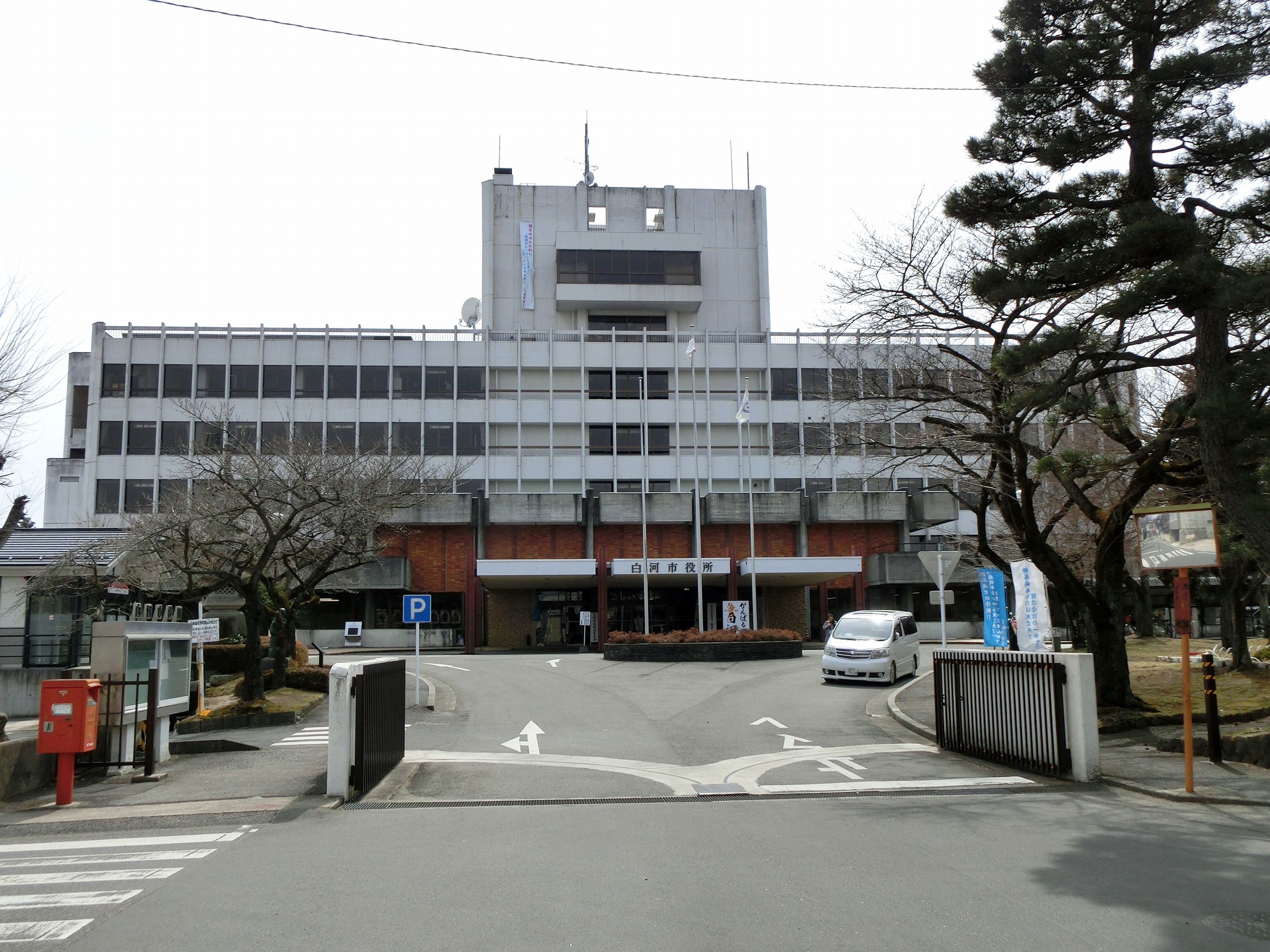 白河市役所